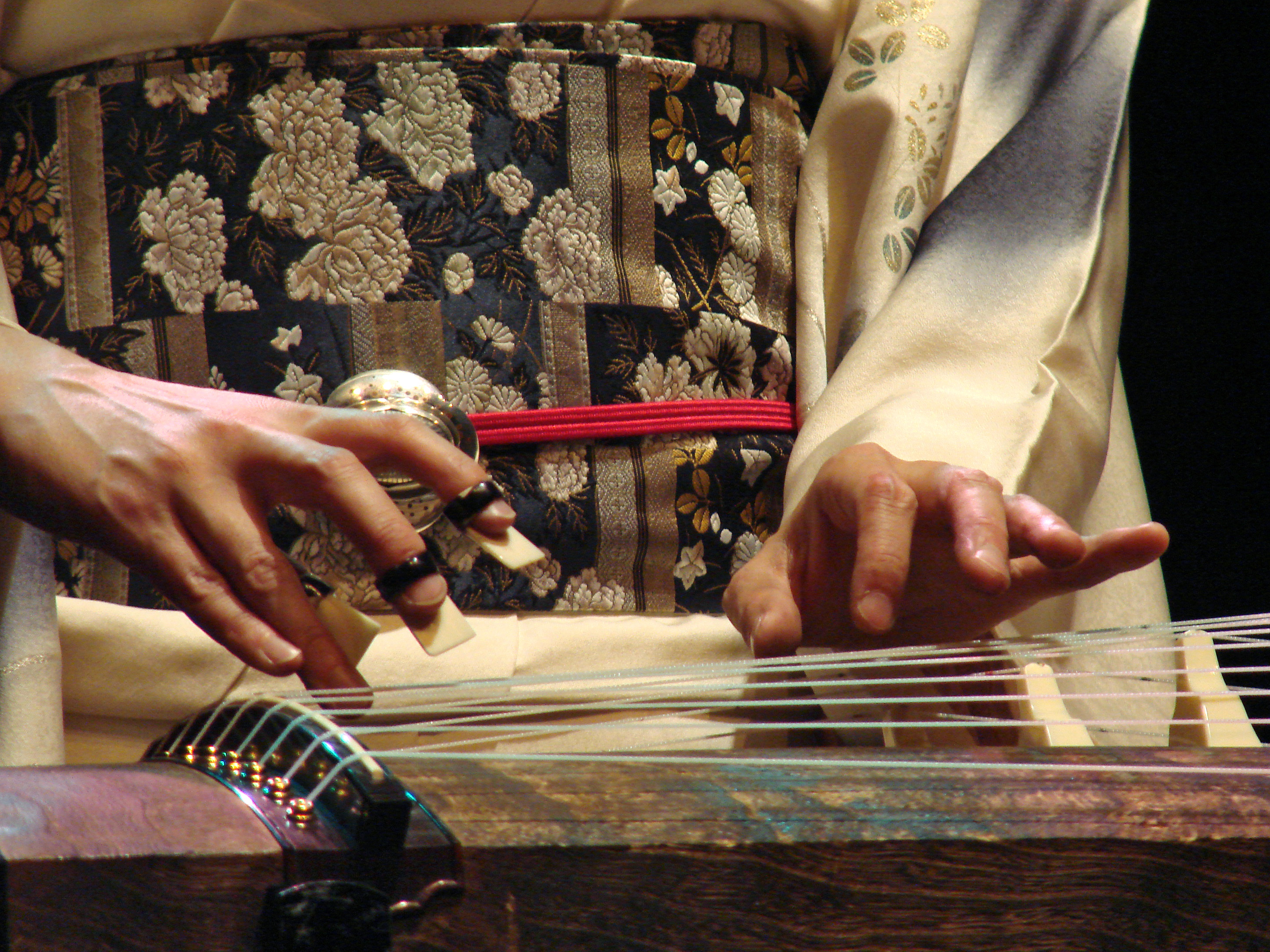 Mieko Miyazaki jouant du Koto, lors de son concert en trio, vendredi 4 avril au Musée Guimet (Paris) "Le parcours de Mieko Miyazaki débute à l’âge de neuf ans avec la découverte du koto. Son apprentissage auprès de Tomizo Huruya et Sachiko Tamura, puis au sein de la Tokyo National University of Fine Arts and Music est couronné par une prestation en présence de l’Empereur et de l’Impératrice du Japon dans le cadre du palais impérial. Peu après, elle remporte les plus hautes distinctions lors des auditions de la radio nationale N.H.K. Bientôt ses concerts en Asie, en Europe et aux Etats-Unis la consacrent comme concertiste de premier plan. Son répertoire d’œuvres classiques et traditionnelles s’enrichit régulièrement de ses propres compositions, qu’elles soient commandes des chaînes de télévision japonaises ou créations originales. En 2006, l’une d’elles, The current, est élue comme l’une des trente plus belles compositions de tous les temps pour le koto. Au fil des années son langage musical s’est enrichi de nouvelles expériences et notamment de la fondation avec Bruno Maurice et Manuel Solans, du trio Miyazaki". site officiel de Mieko Miyazaki